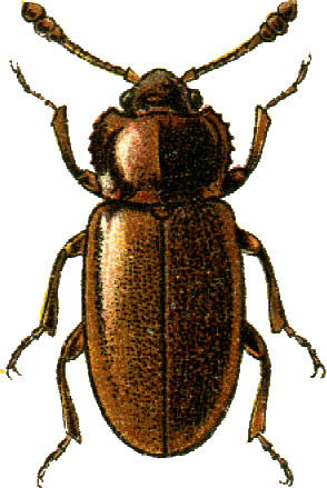 This file has been extracted from another file: Jacobs23.jpg